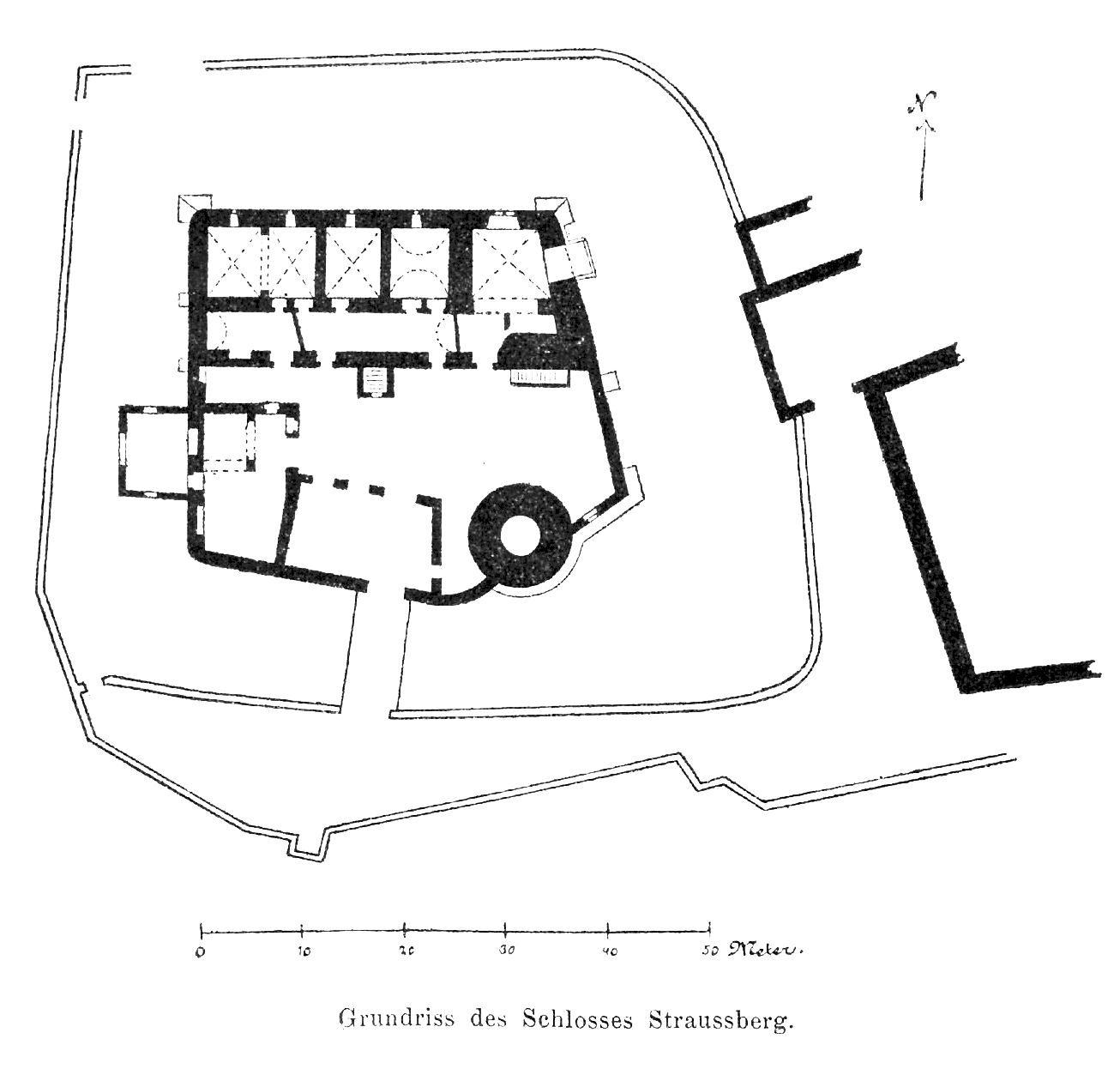 Plan der Burgruine Straussberg im Fürstentum Schwarzburg-Rudolstadt, Amtsgerichtsbezirk Schlotheim.